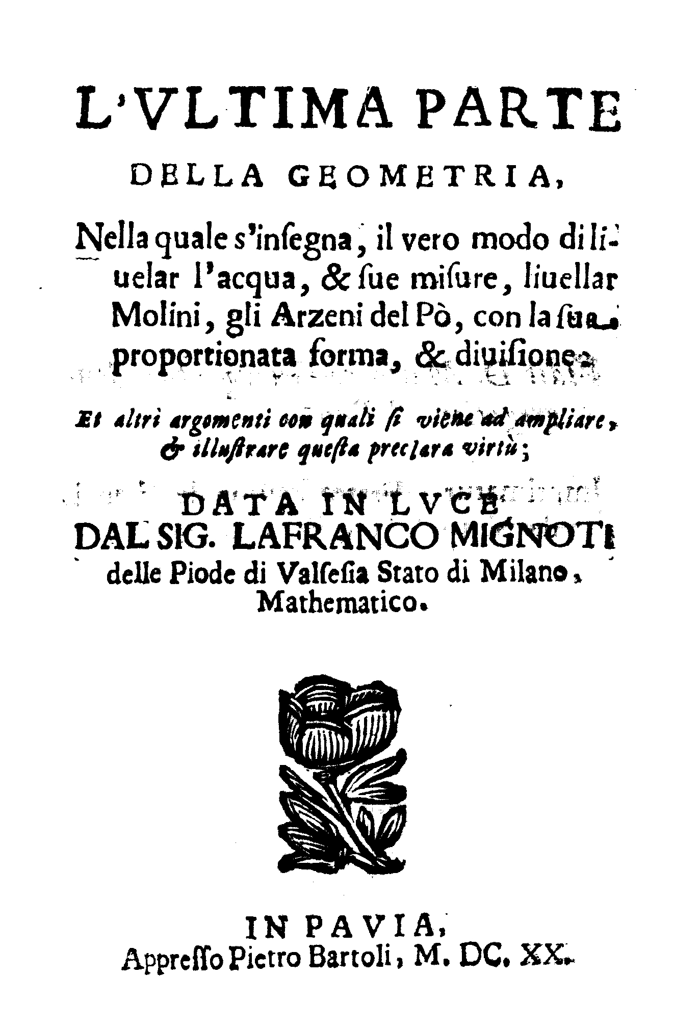 L'vltima parte della geometria, nella quale s'insegna il vero modo di liuelar l'acqua & sue misure, liuellar molini, gli arzeni del Pò, con la sua proportionata forma, & diuisione ... data in luce dal sig. Lafranco Mignot delle Piode di Valsesia stato di Milano, mathematico. - In Pavia : appresso Pietro Bartoli, 1620. - [16] c. ; 8º .